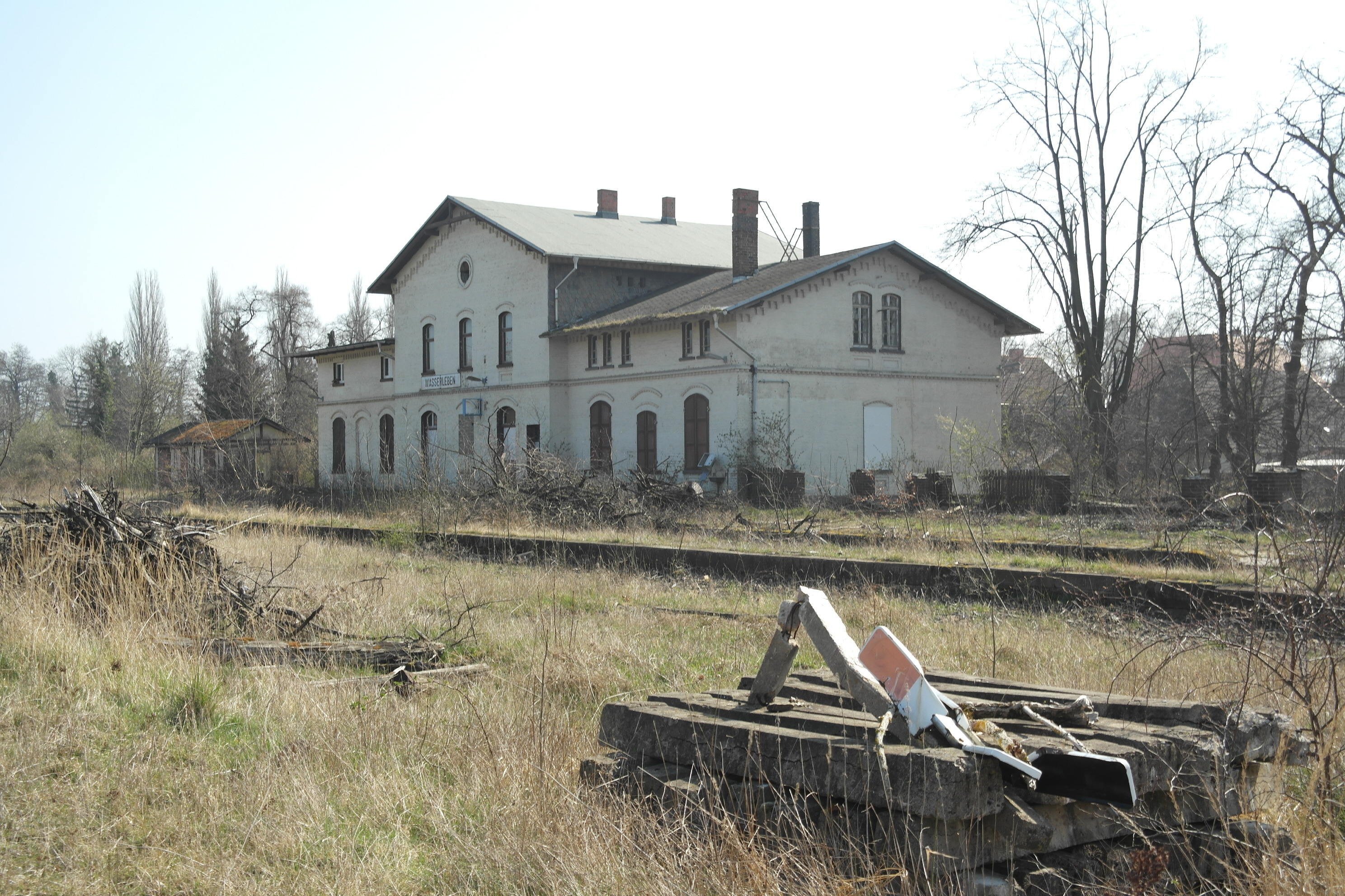 Bahnhof Wasserleben, Gleisseite mit Bahnsteigresten